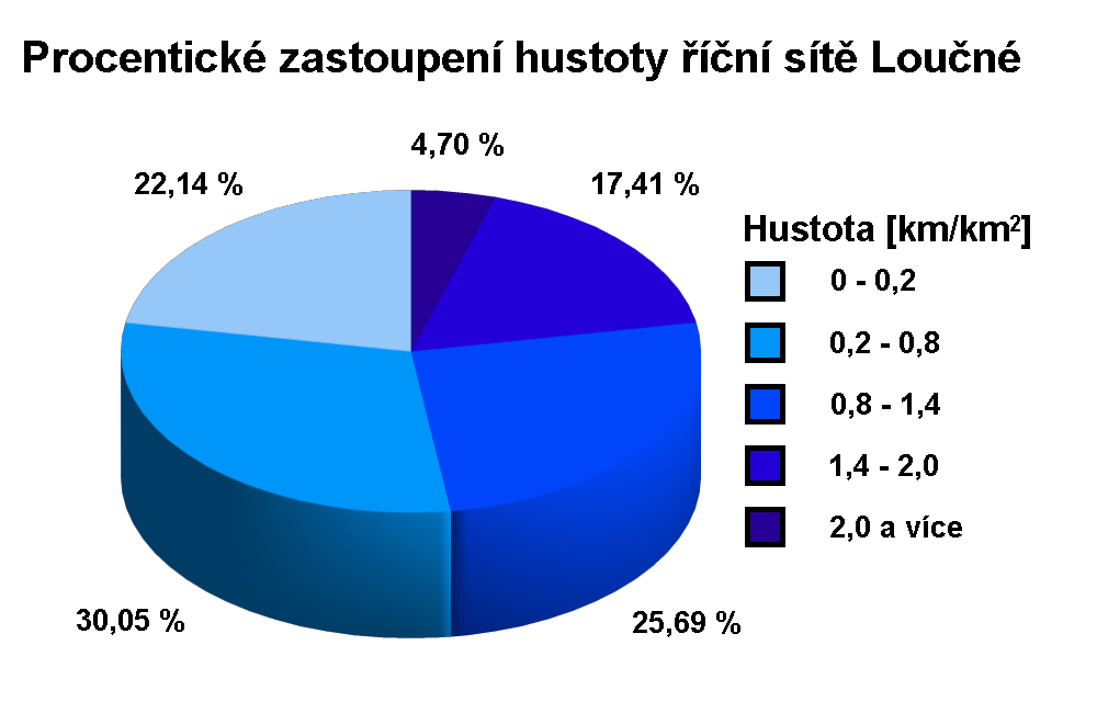 Procentické zastoupení hustoty říční sítě Loučné